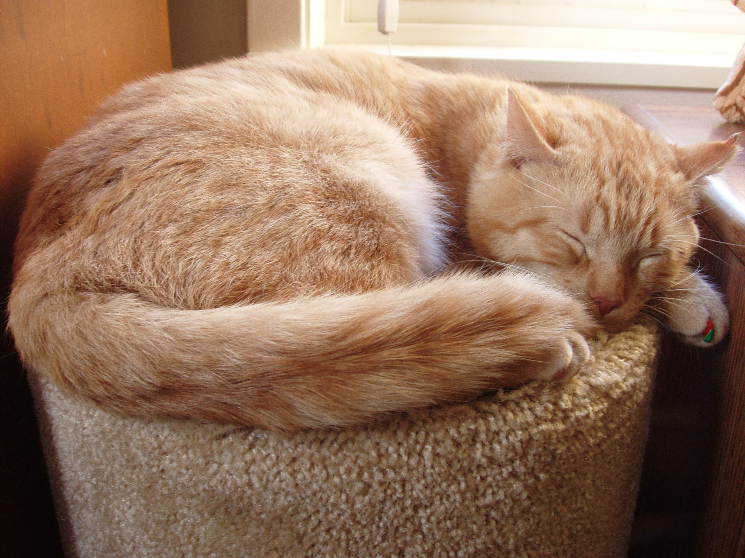 Orange Tabby sleeping